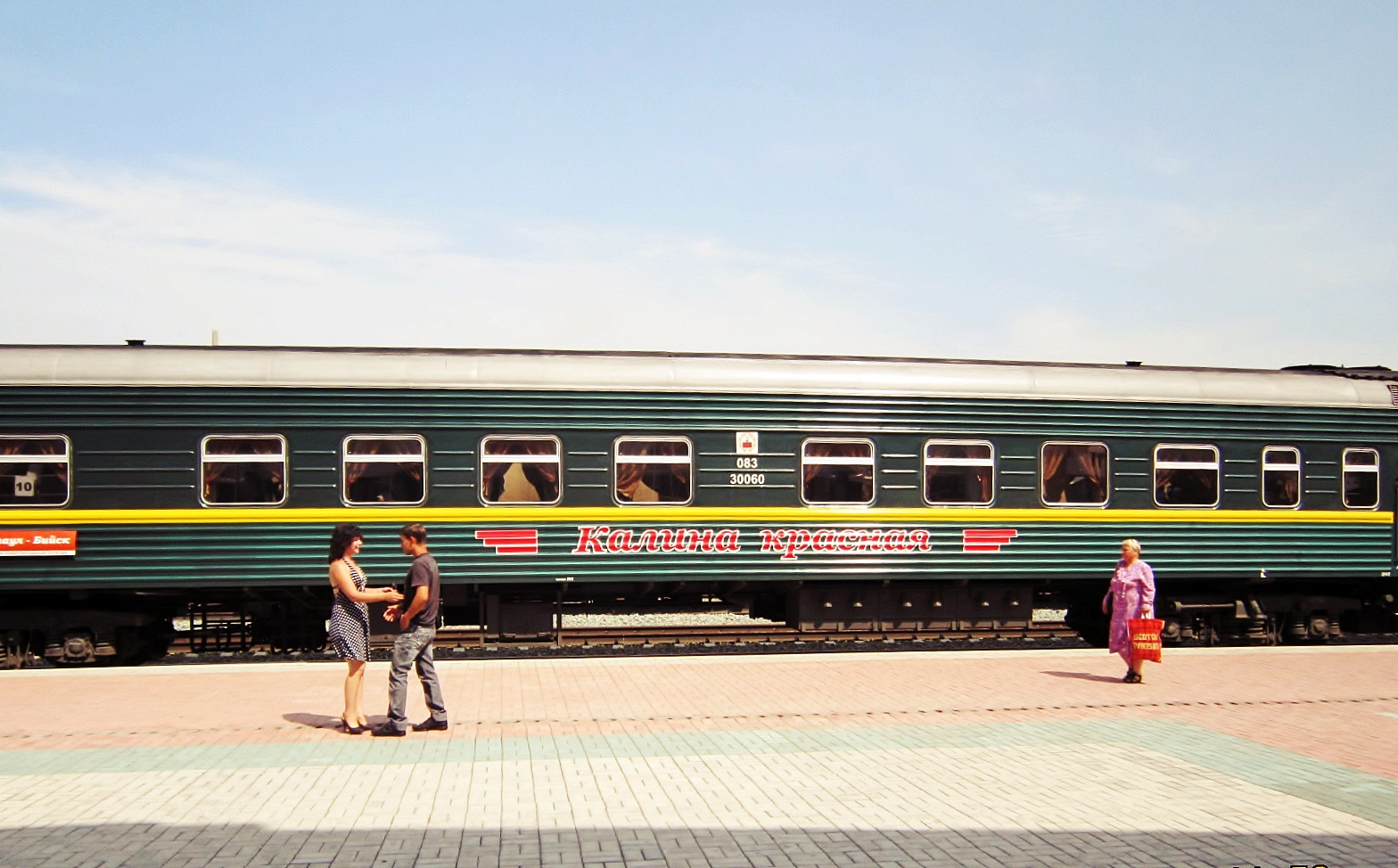 Поезд "Калина красная" на перроне Бийского вокзала. Алтайский край.